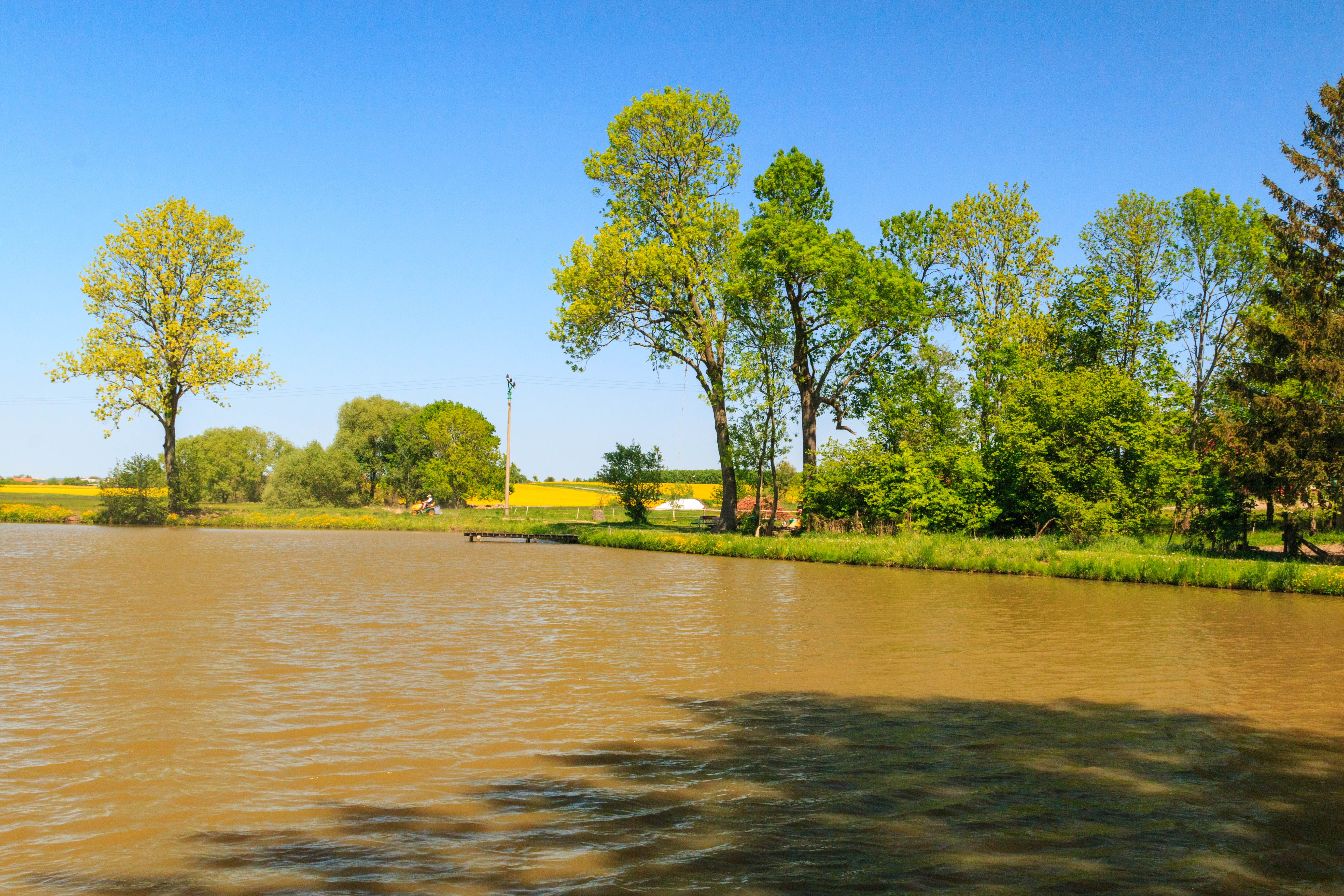 Mlýnský rybník v Popovicích Project: Vodstvo.